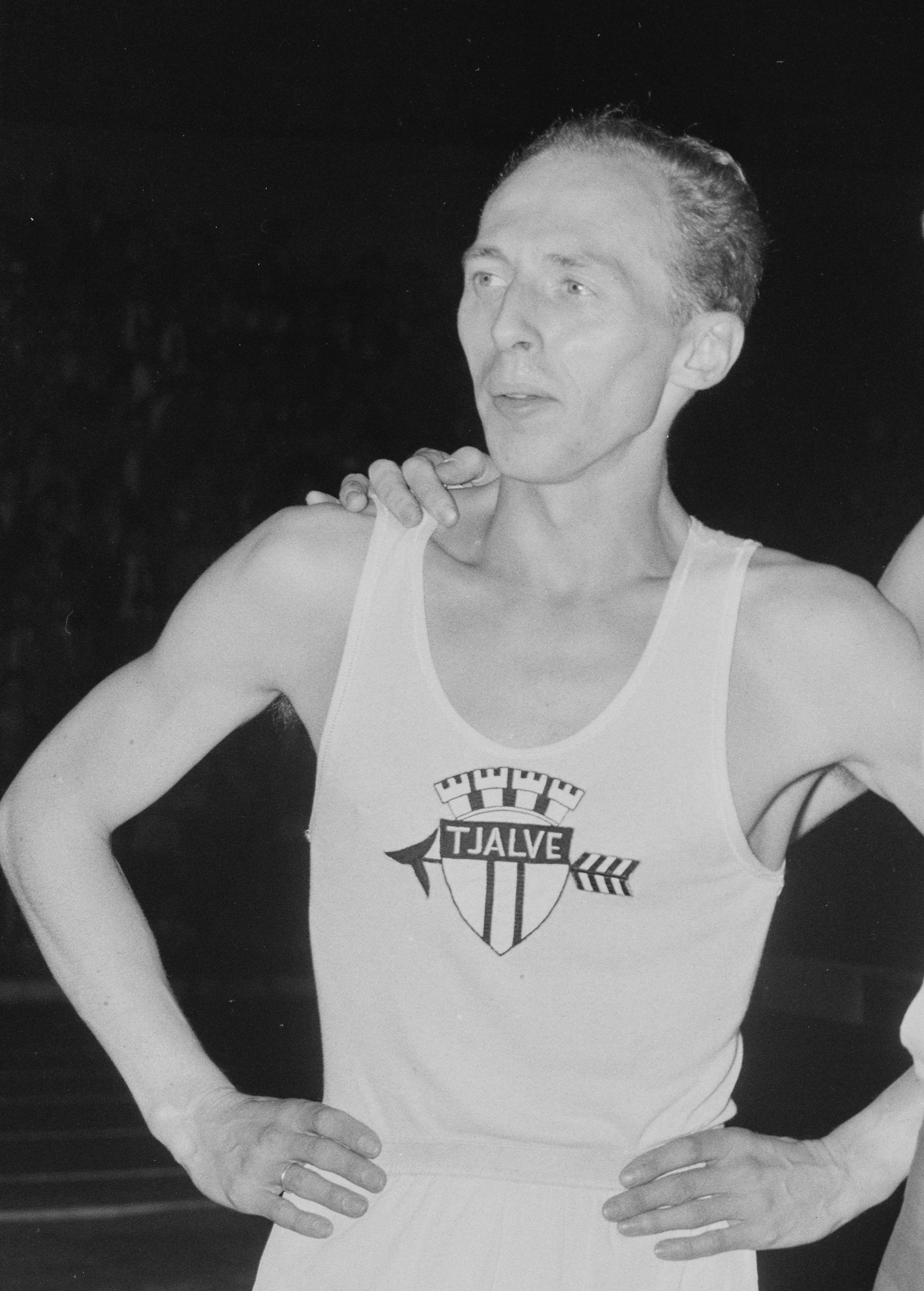 Bildet er hentet fra Arkivverket. Friidrett, Bislet (Oslo-lekene). NÅ nr. 20, 1953. A: Sverre Strandli, slegge; Imre Nemeth, slegge; Joseph Czermak, slegge; Egil Danielsen, spyd; Gordon Pirie, langdistanse; Audun Boysen, mellomdistanse (med Nielsen); Gunnar Nielsen, dansk mellomdistanseløper.B: Tabori; Ikaros; Boysen; Strandli; Danielsen Arkivinstitusjon : Riksarkivet Arkivnavn : Billedbladet NÅ Sted : Norge, Oslo, Oslo, Bislet Emneord: Friidrett, Sport, Idrett Avbildet